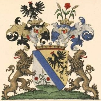 Arpshofeni suguvõsa vabahärravapp